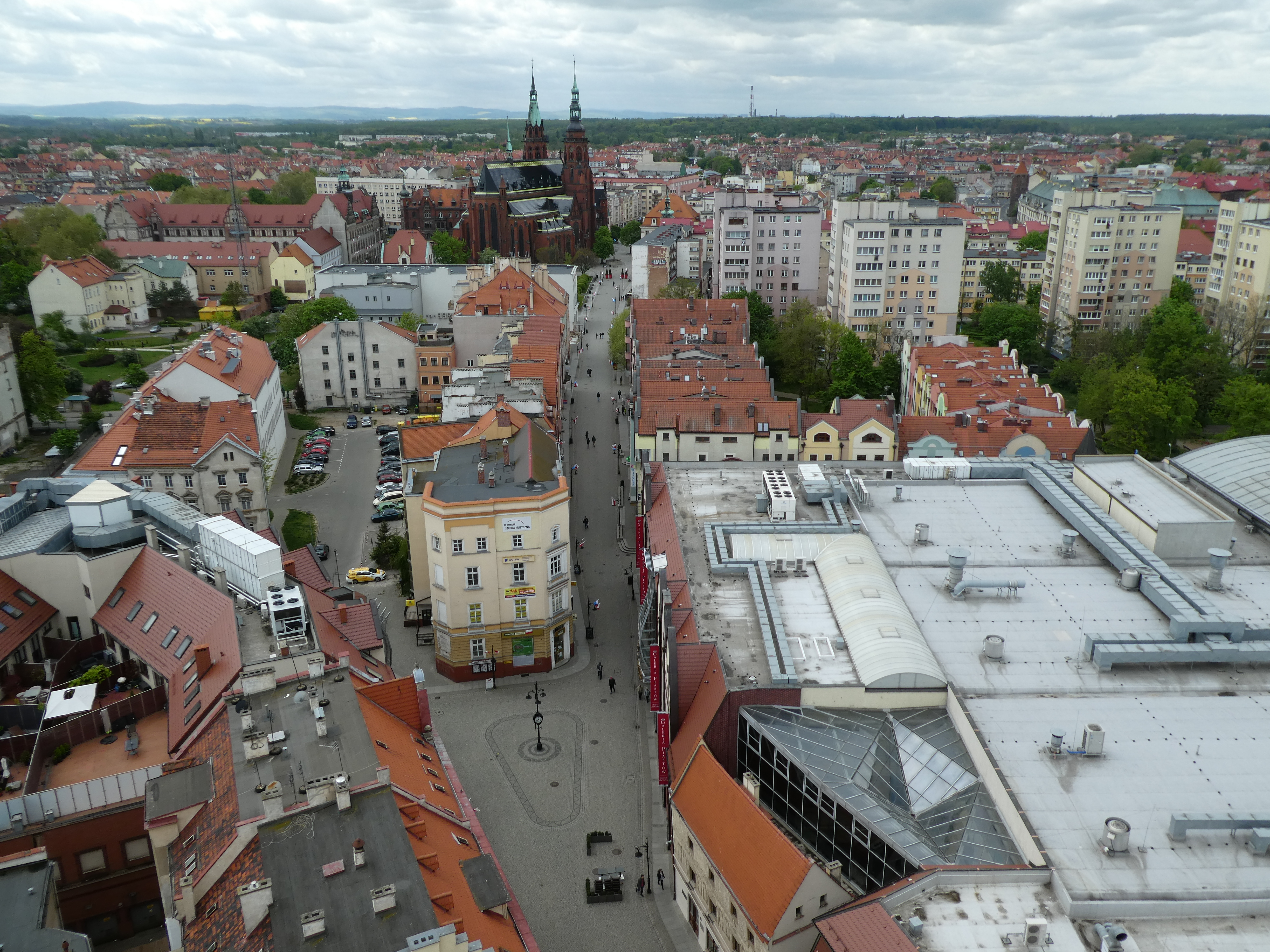 Widok na stare miasto w Legnicy. Zdjęcie wykonane z wieży Kościoła Ewangelickiego.